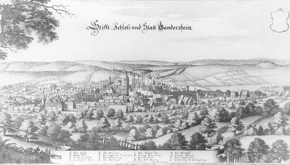 Gandersheim von Merian 1654